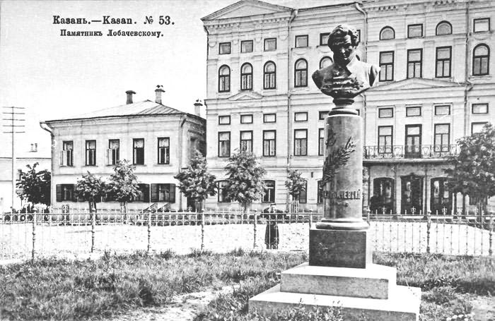 Памятник Лобачевскому. Открытка из серии «Казань» № 53.